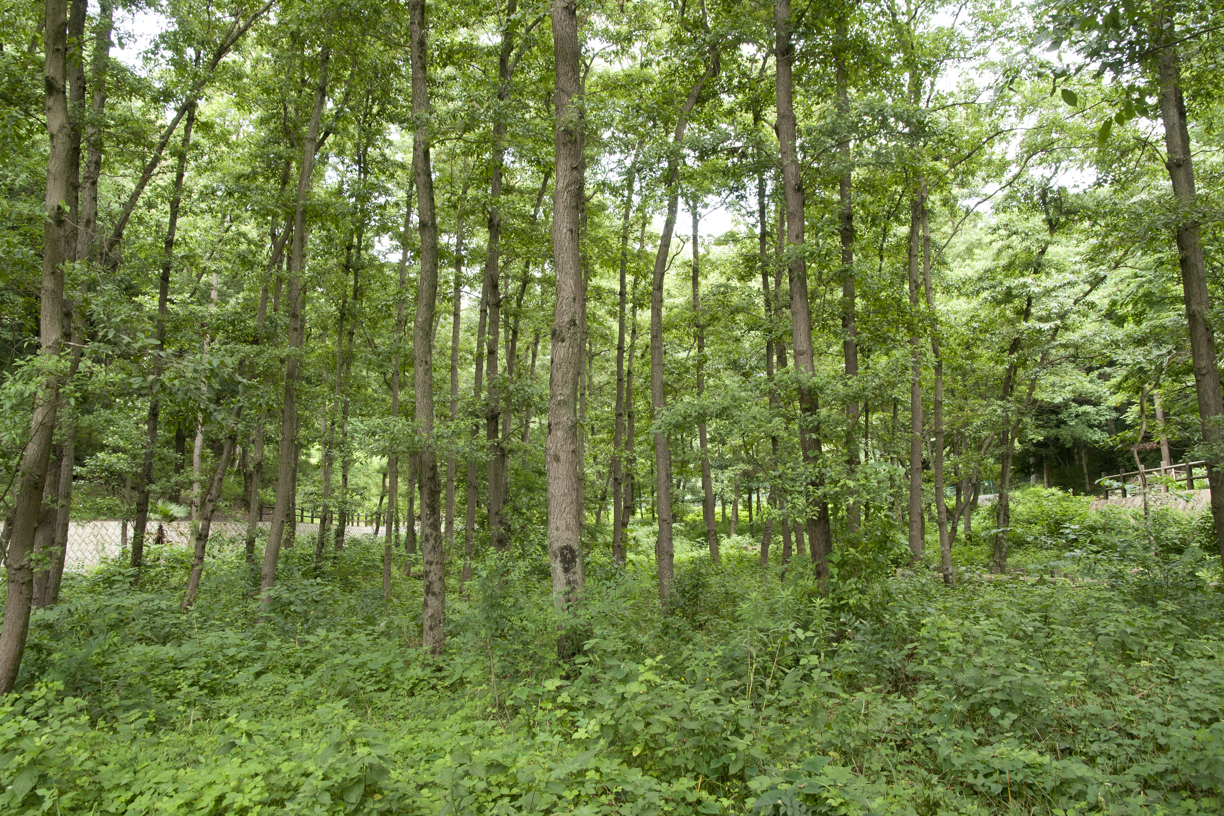 ハンノキ (学名：Alnus japonica)